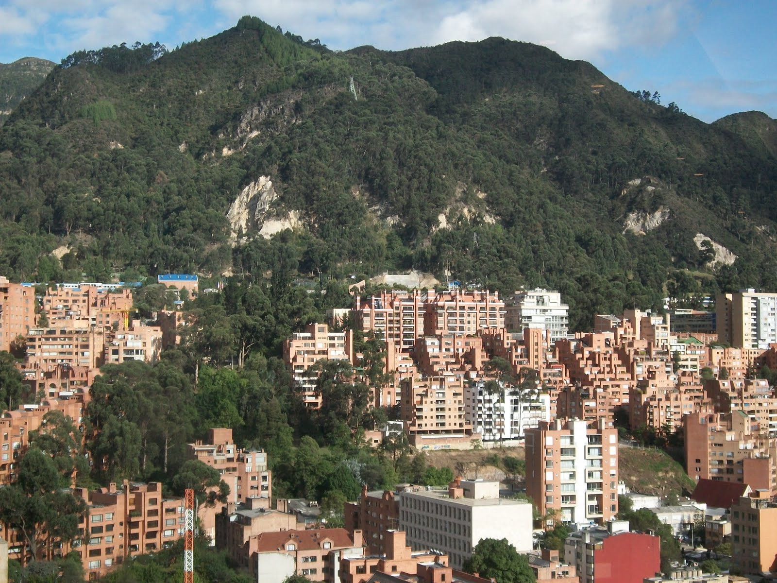 Cerros de Bogotá a la altura de la calle Setenta.